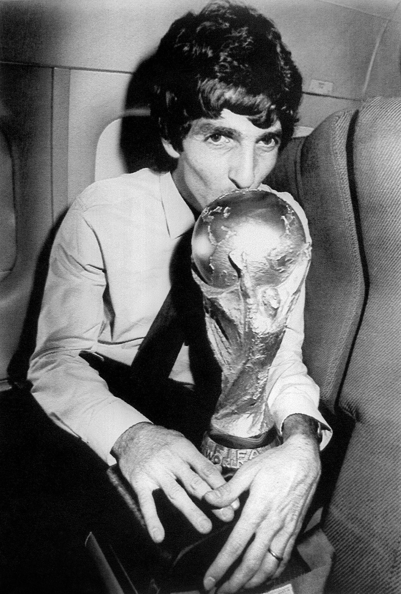 Il calciatore dell'Italia, Paolo Rossi, sull'aereo del ritorno in patria dalla Spagna, bacia la Coppa del Mondo vinta dagli azzurri al campionato del mondo 1982; Rossi contribuì al terzo titolo mondiale della nazionale italiana con 6 gol, che ne fecero il primo calciatore in maglia azzurra a vincere la classifica marcatori di un campionato del mondo. Nota bene: l'immagine è stata scattata in volo su un Douglas DC-9 della presidenza della Repubblica Italiana, quindi da intendersi in territorio italiano.